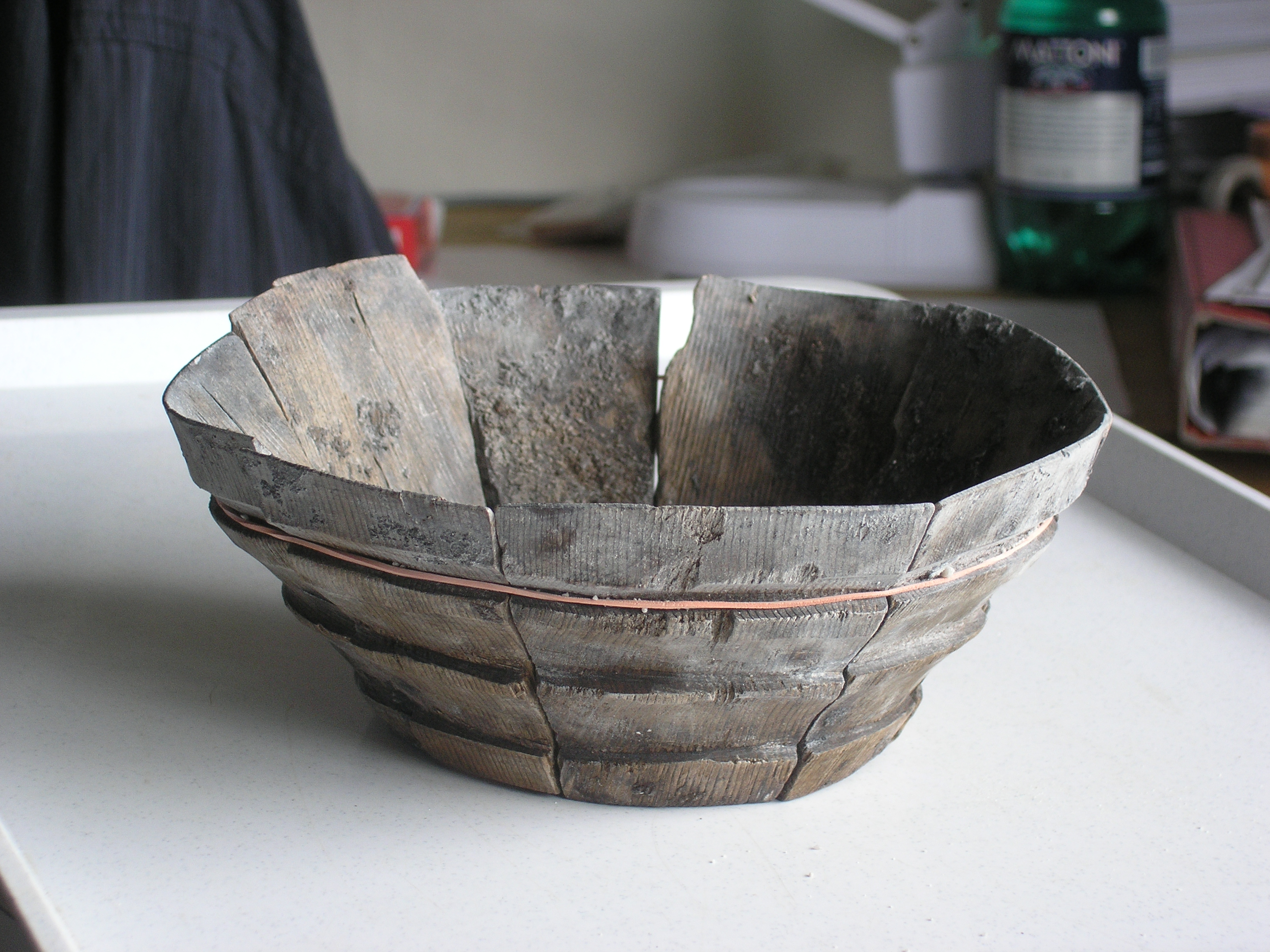 Archeologický artefakt: Dýhová miska, 15. stol., lokalita Plzeň Perlová ul. čp. 66/67, vrstva 0104I